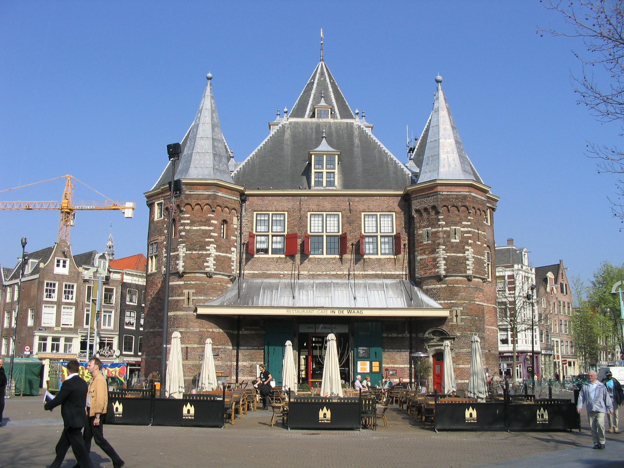 De Waag (Stadtwaage) von Amsterdam